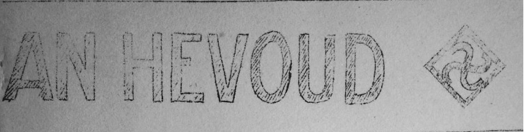 Logo ar c'helc'h lizher an Hevoud.